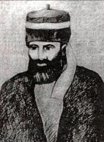 Kunta-haji, 1860ies drawung